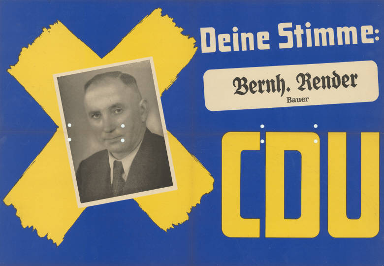 Deine Stimme: Bernh. Render Bauer CDU Abbildung: Porträtfoto - Stimmkreuz Plakatart: Kandidaten-/Personenplakat mit Porträt Objekt-Signatur: 10-009 : 171 Bestand: Landtagswahlplakate Nordrhein-Westfalen (10-009) GliederungBestand10-18: Landtagswahlplakate Nordrhein-Westfalen (10-009) » Landtagswahl am 18.6.1950 » CDU » mit Porträtfoto Lizenz: KAS/ACDP 10-009 : 171 CC-BY-SA 3.0 DE